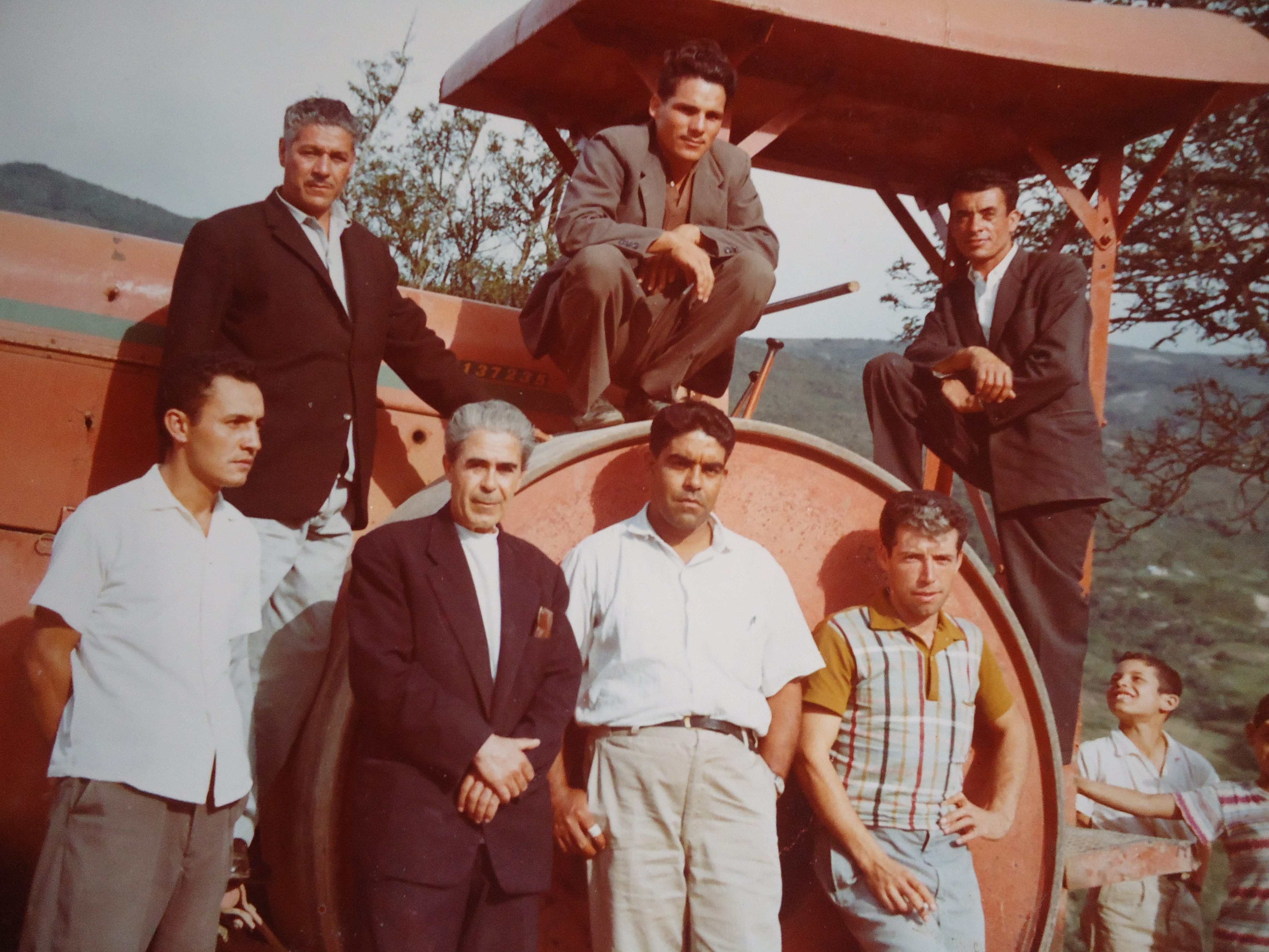 Nueva Carretra al Vitoró en el año 1967